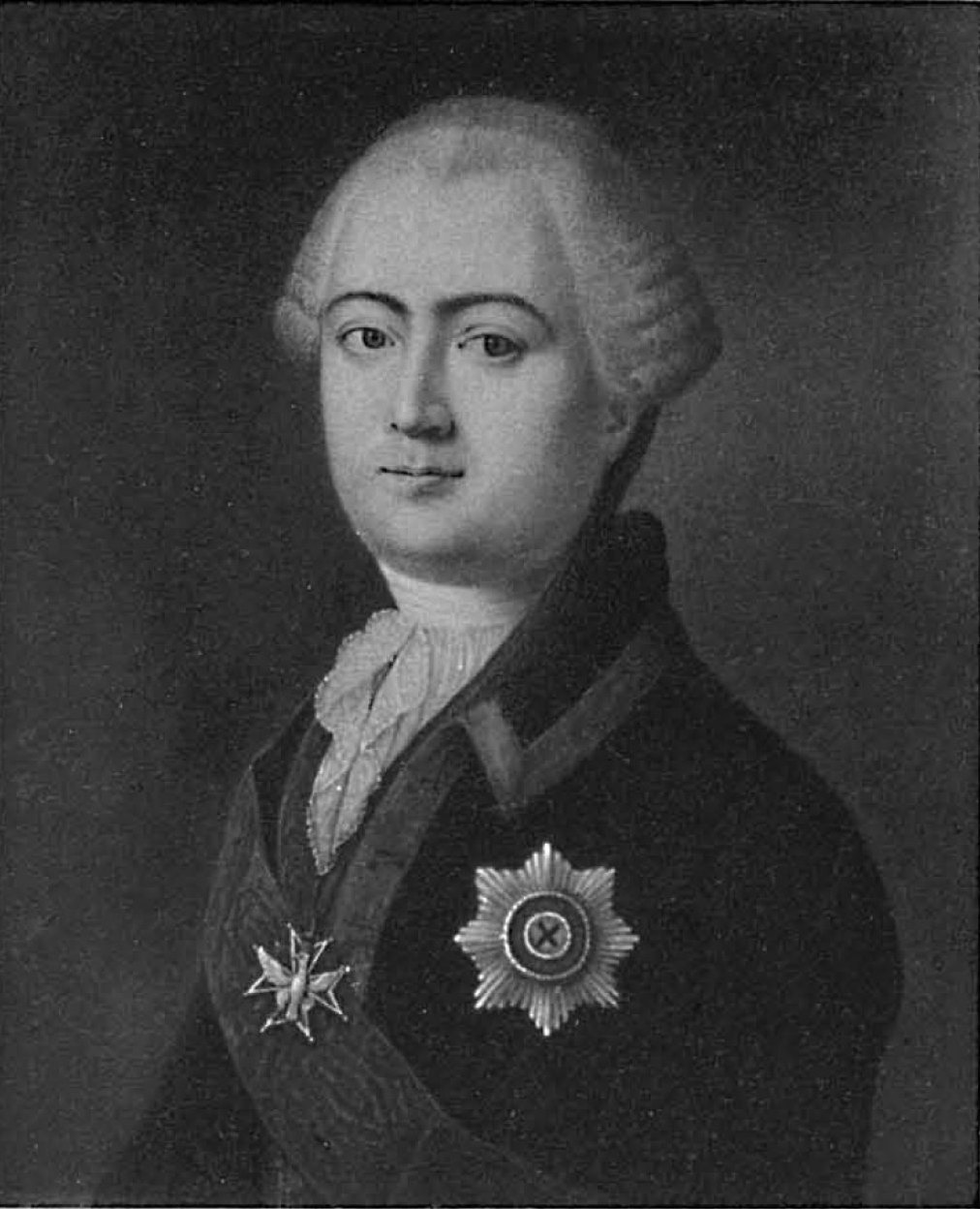 Граф Алексей Григорьевич Разумовский (1709-1771)